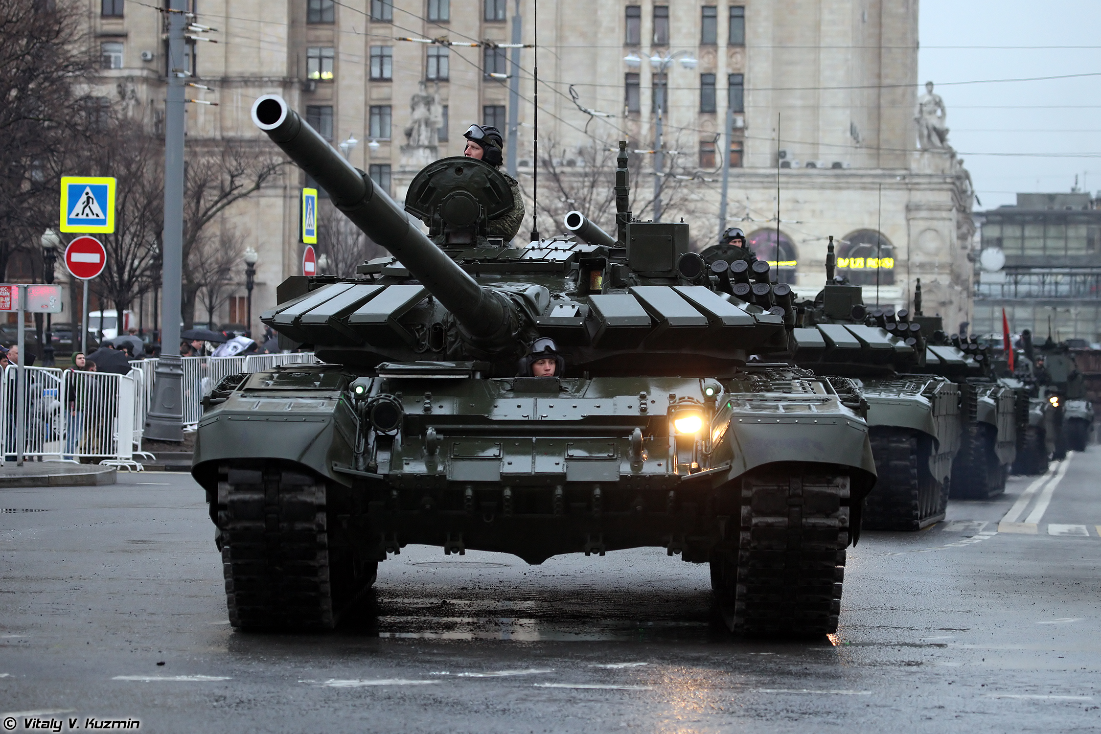 Модернизированный Т-72Б3 с дополнительной защитой (Modernized T-72B3 with additional armor)